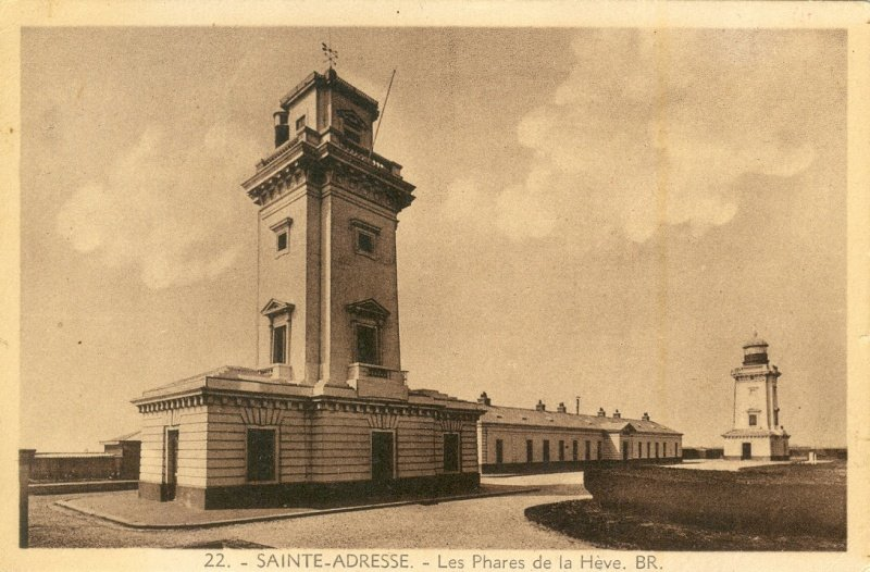 Sainte-Adresse (Seine-Maritime - France) : phares de la Hève